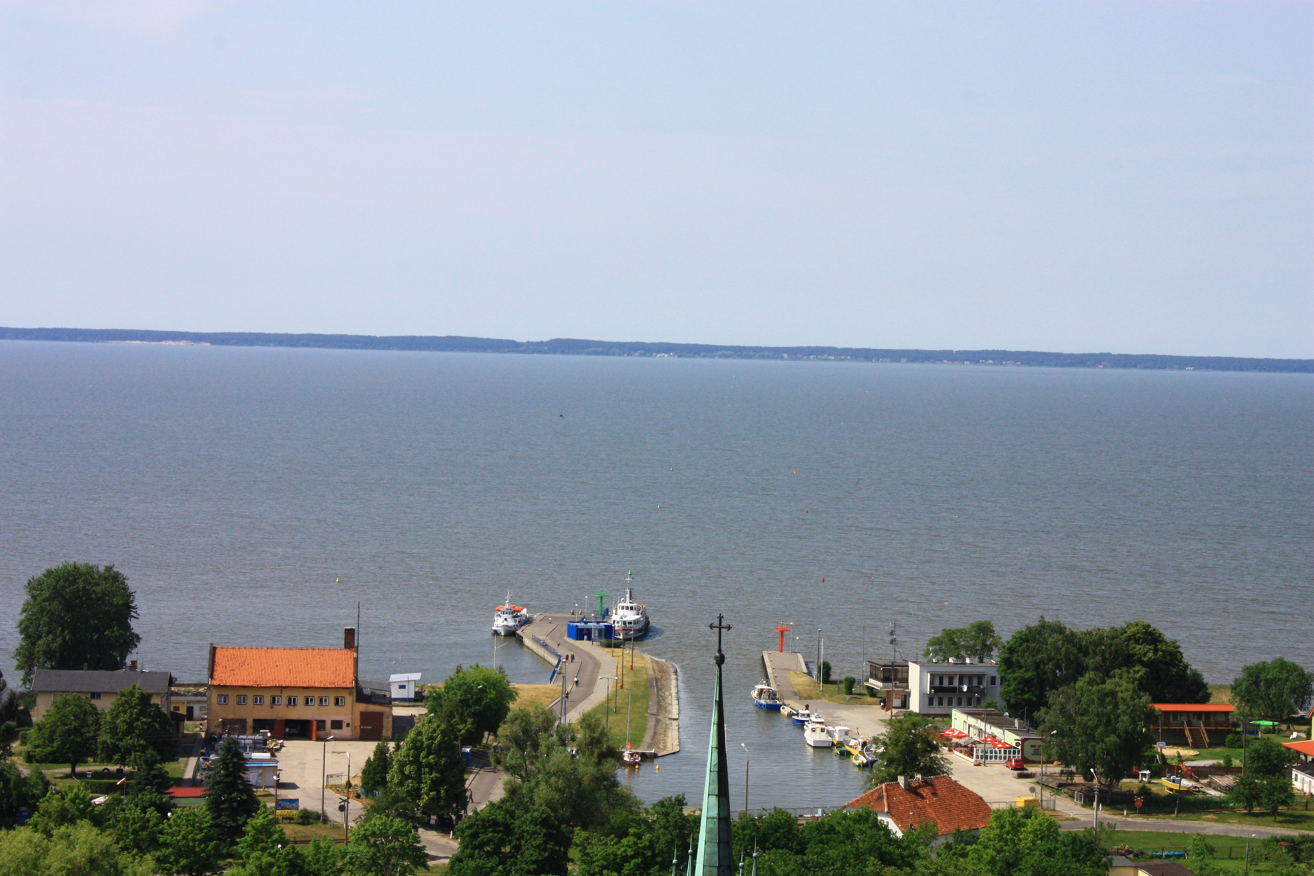 Frombork, założenie urbanistyczne Starego Miasta, 1310